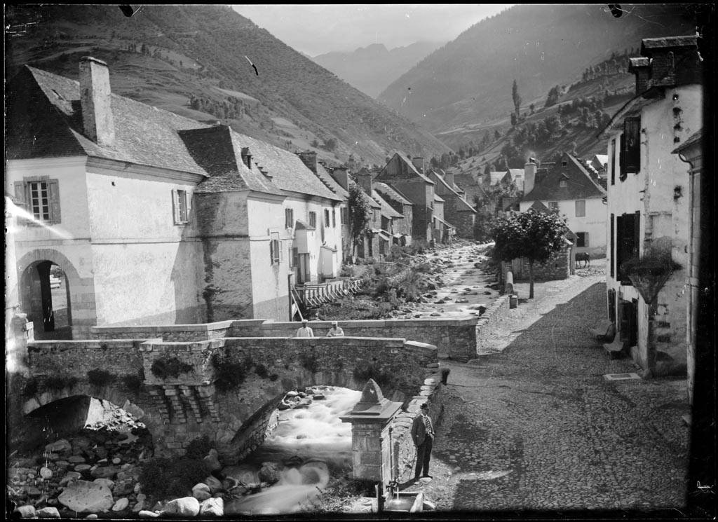 Imatge